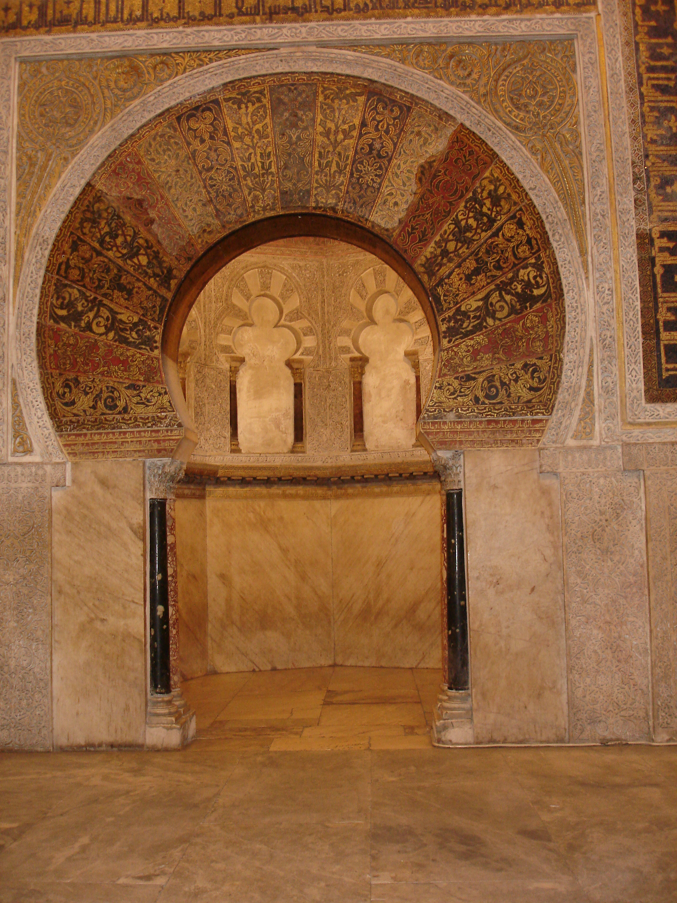 Mirhab de la Mosquée aux mille colonnes, à Cordoue